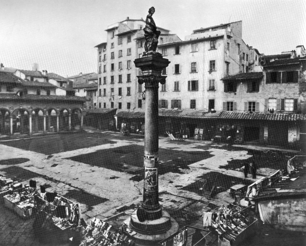 Repubblica square in 1883 (colonna dell'abbondanza)